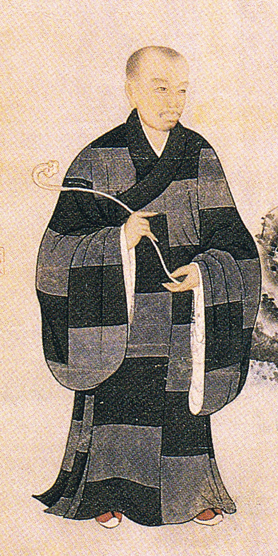 喜多元規 即非・千呆像（部分）絹本着色